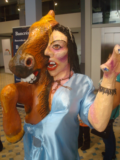 La Cegua. Mascarada tradicional costarricense 2013.